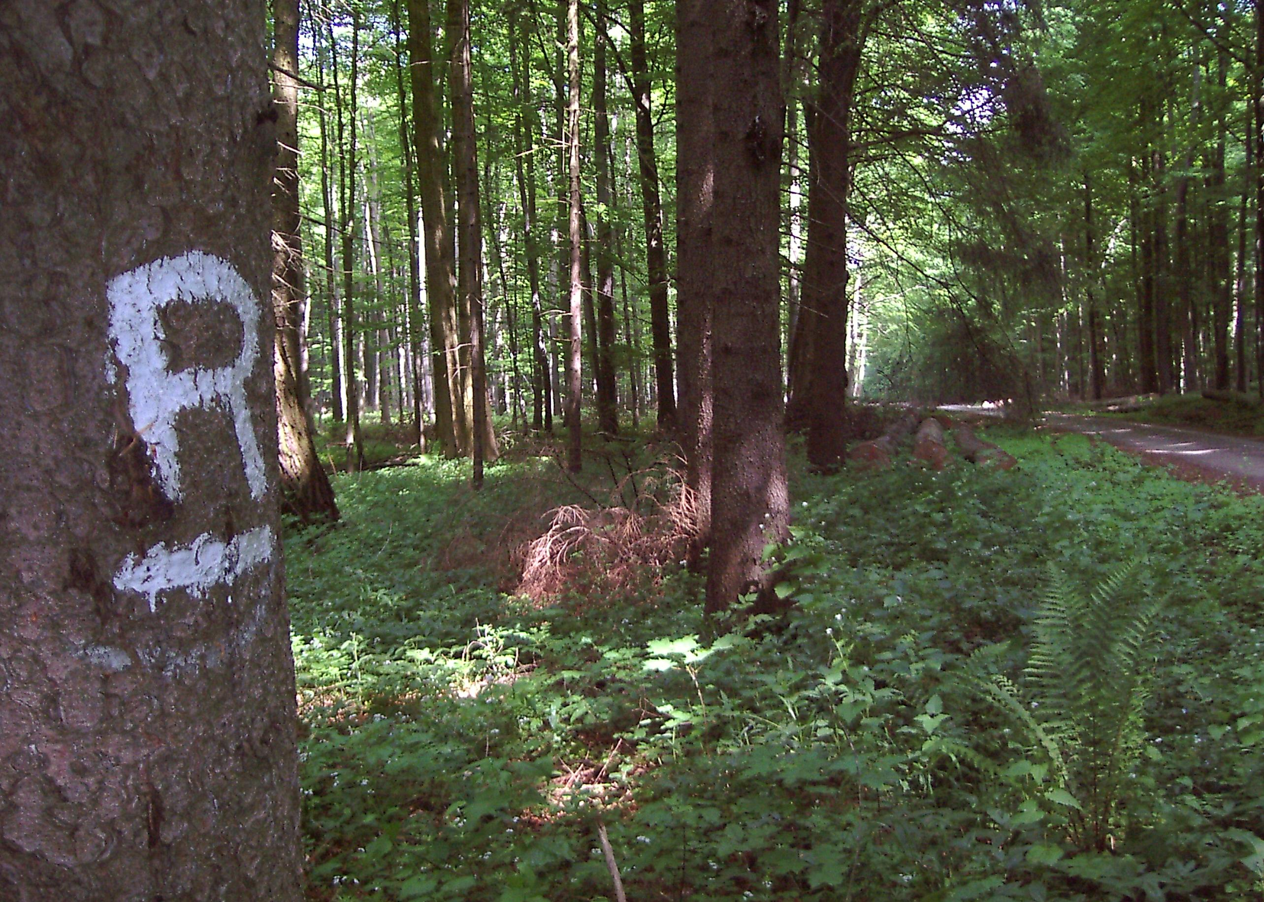 Der Rennstieg bei Eigenrieden und seine Markierung, ein R auf weißem Strich.